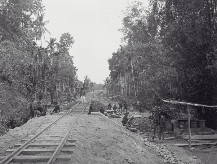 Foto. De Atjeh-spoorlijn bij Idi